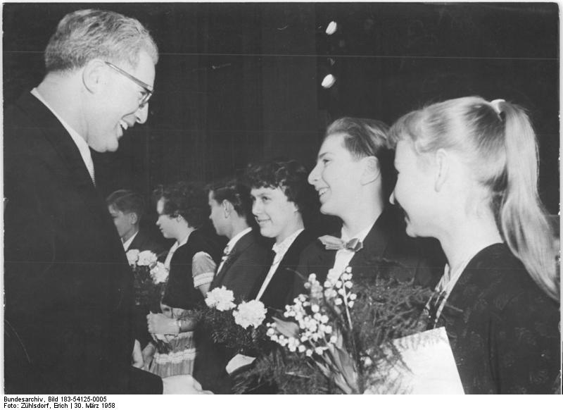 Berlin, Jugendweihe, Feierstunde Zentralbild Zühlsdorf 30.3.1958 Me-L Jugendweihen 1958 begannen Im festlich geschmückten Theater der Freundschaft fanden am Vormittag des 30.3.1958 die ersten Jugendweihen des Jahres 1958 in Berlin statt. Im Theater der Freundschaft erhielten in zwei Veranstaltungen 120 Jungen und Mädchen aus dem Stadtbezirk Berlin-Friedrichshain die Jugendweihe (Näheres siehe ADN-Meldungen) UBz: Held der Arbeit, Staatssekretär Max Friedemann beglückwünscht die Jugendlichen, die die Jugendweihe erhielten.